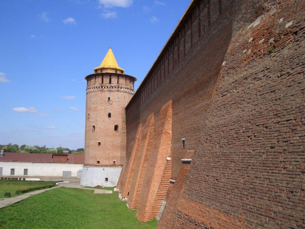 Коломенский Кремль. Маринкина (Коломенская) башня.